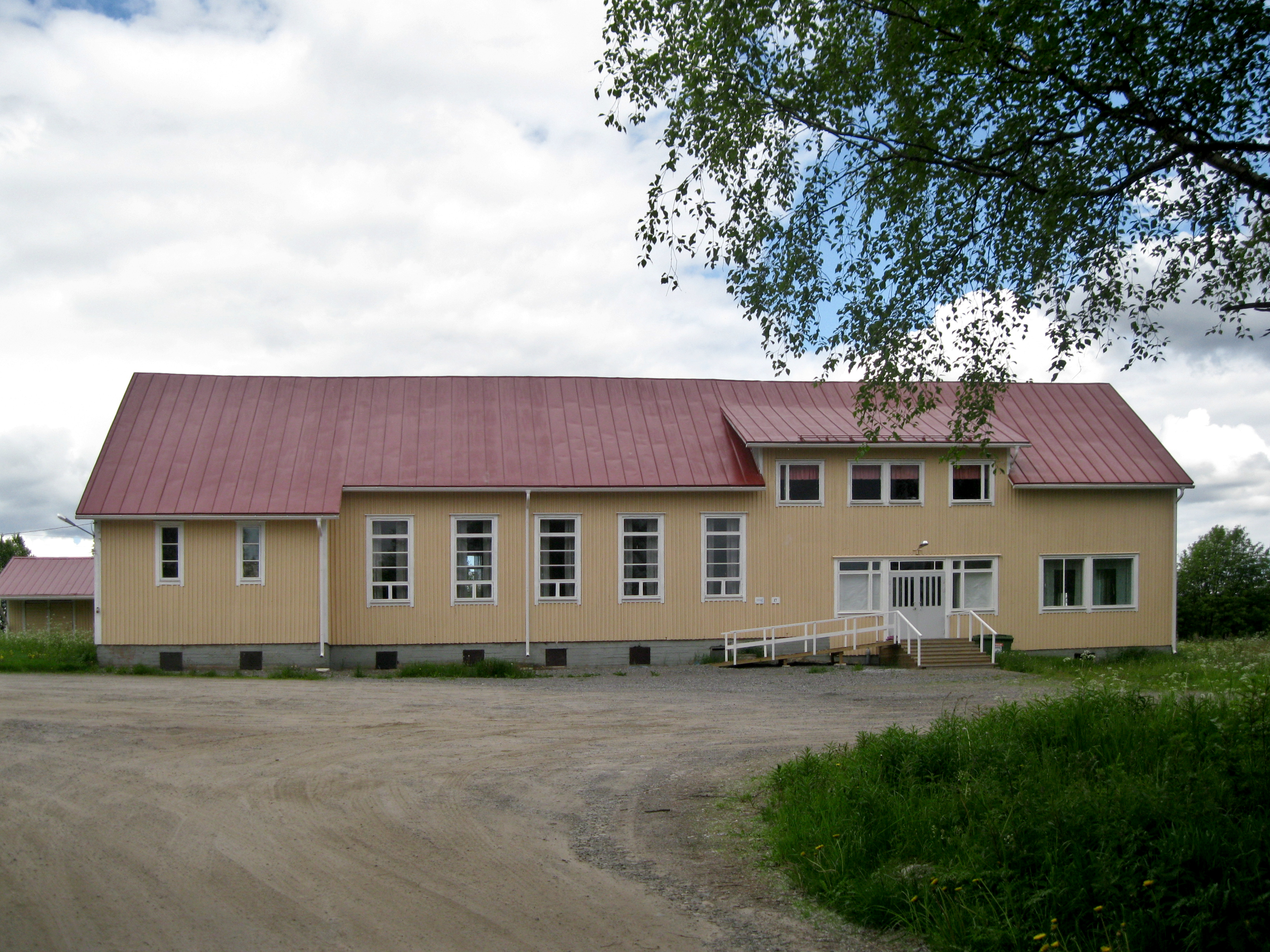 Itäkylän Nuorisoseuran -rakennus, kesäkuussa 2015.